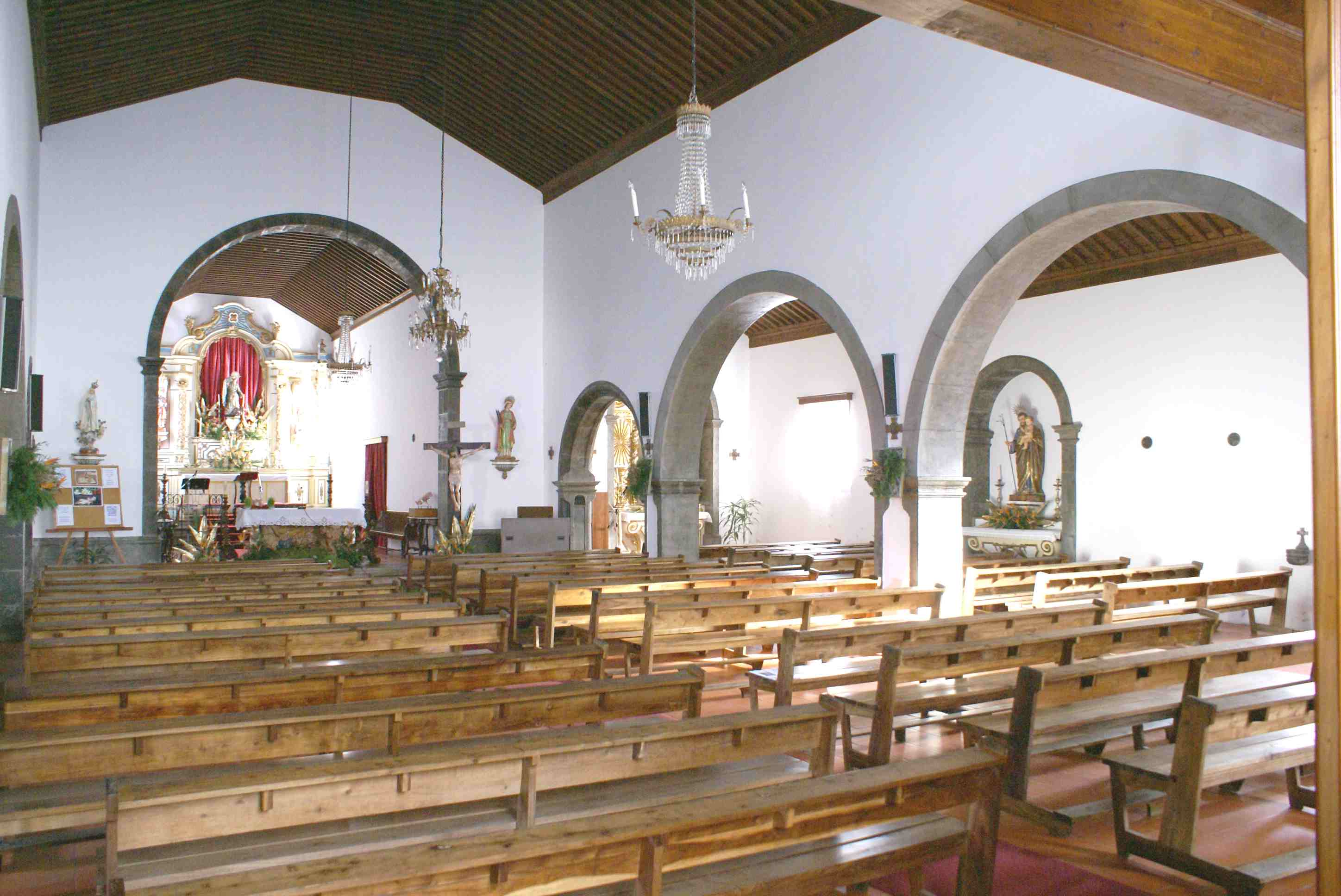 Igreja de São Bartolomeu, interior, freguesia de São Bartolomeu dos Regatos, Angra do Heroísmo, ilha Terceira, Açores, Portugal.